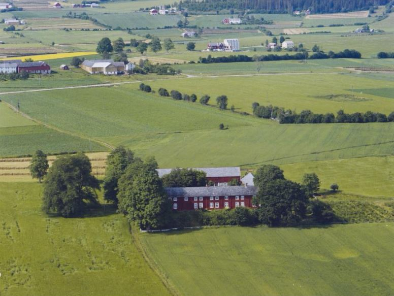 Logstein på Frosta i Nord-Trøndelag fylke.